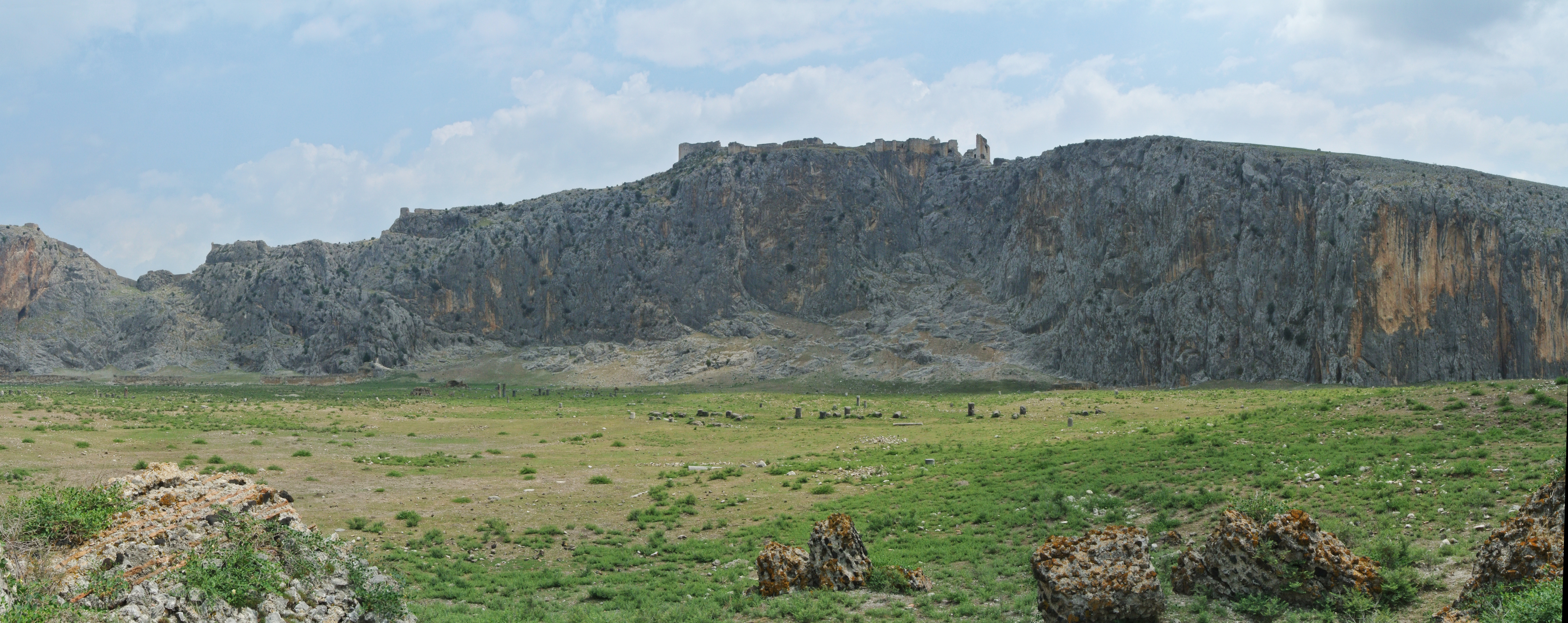 Site archéologique d'Anazarbe (village de Dillekaya, province d'Adana, Turquie) vue générale de la ville romaine et de la forteresse médiévale